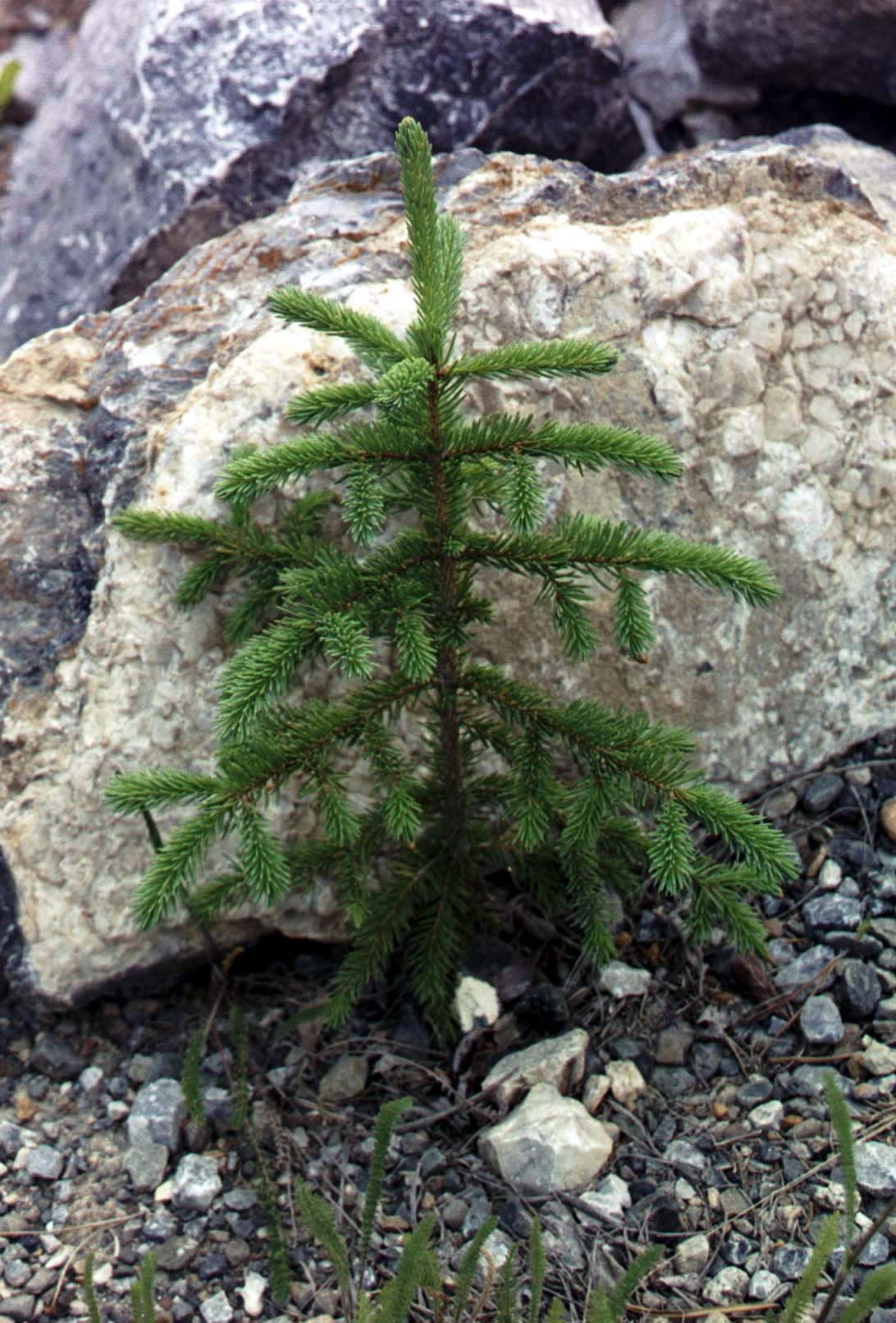 Picea glauca sapling, Kluane National Park, Yukon, Canada.